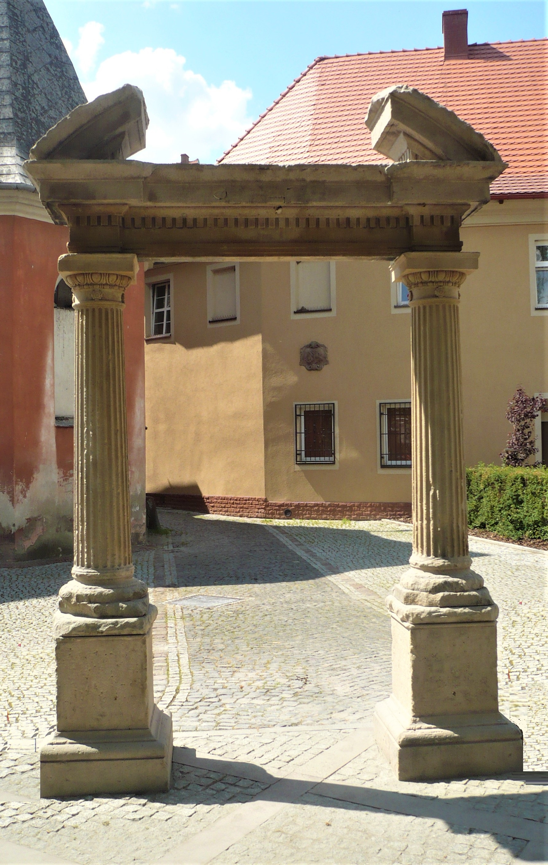 Brama ul. Piastów 19a w Nowej Rudzie